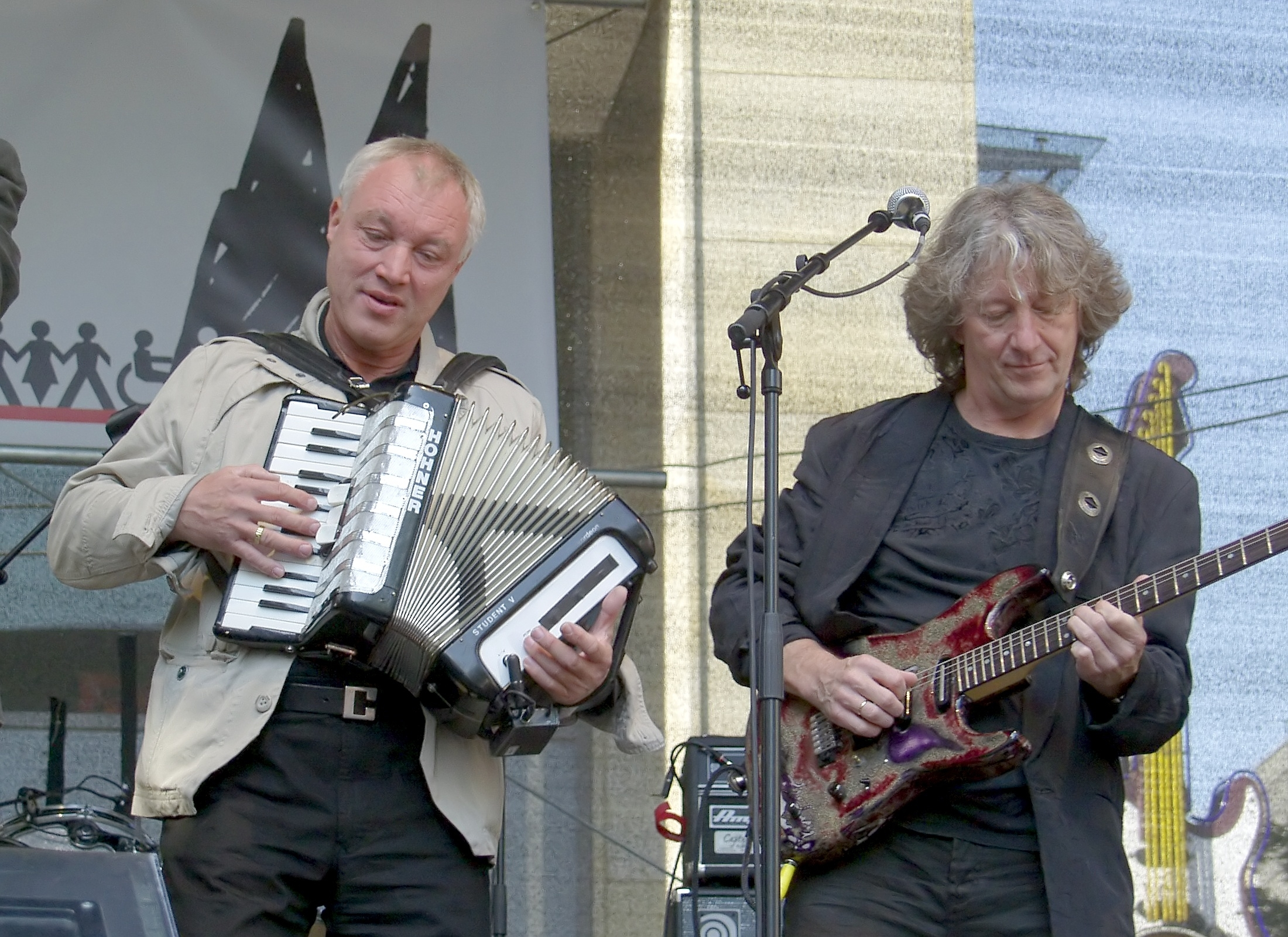 Peter Werner und John Parsons der Gruppe „Höhner“ auf der politischen Demonstration „Köln stellt sich quer“ gegen den so genannten „Anti-Islamisierungskongress“ der rechtsgerichteten Partei „Pro Köln“ vor dem Gürzenich in Köln.